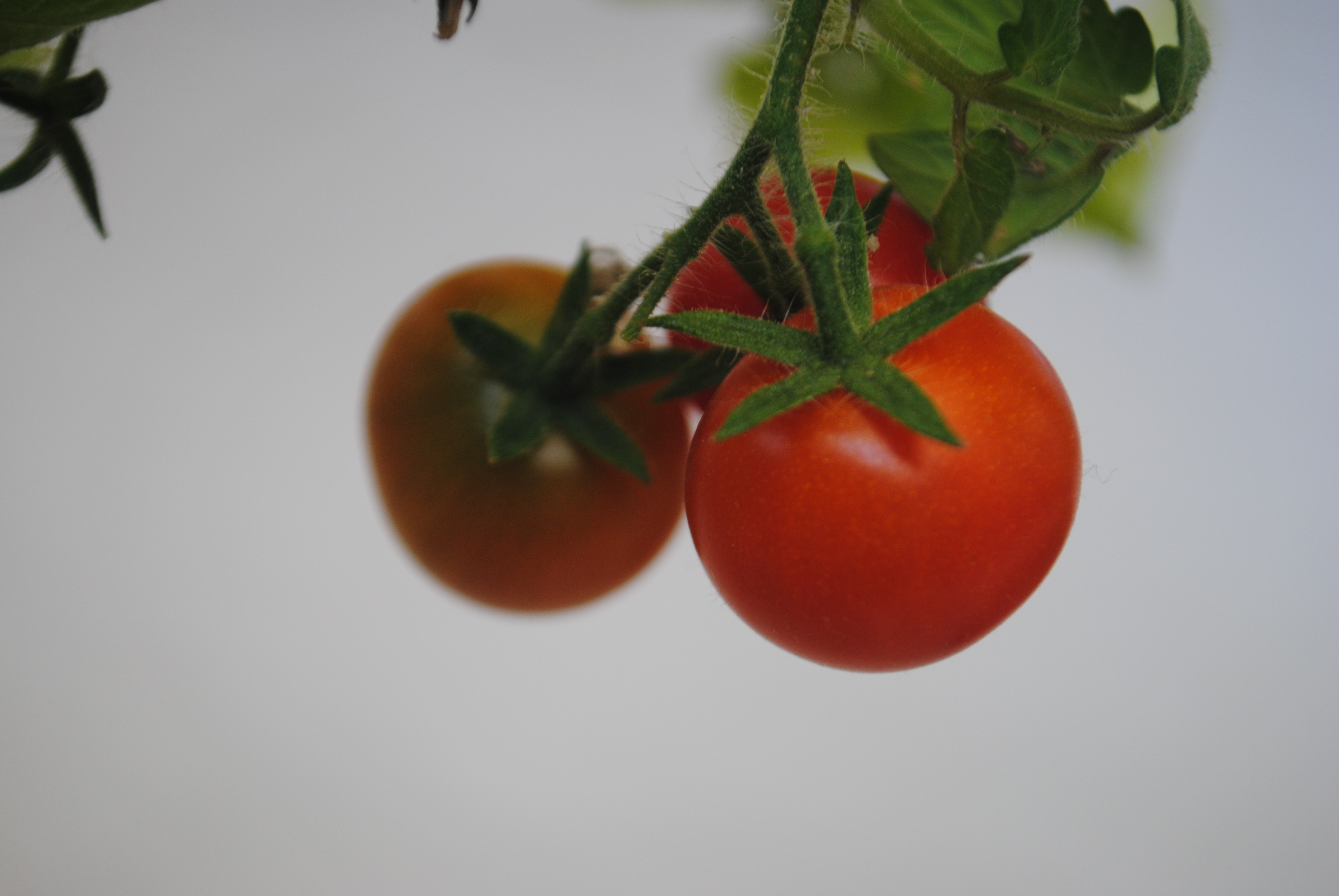 çeşitli domates görüntüleri